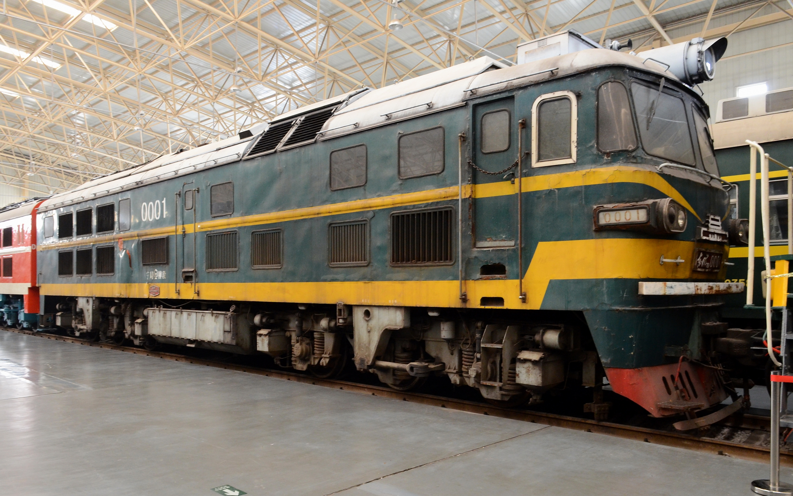 在中国铁道博物馆保存展示的DF7D型0001号机车(山区型)